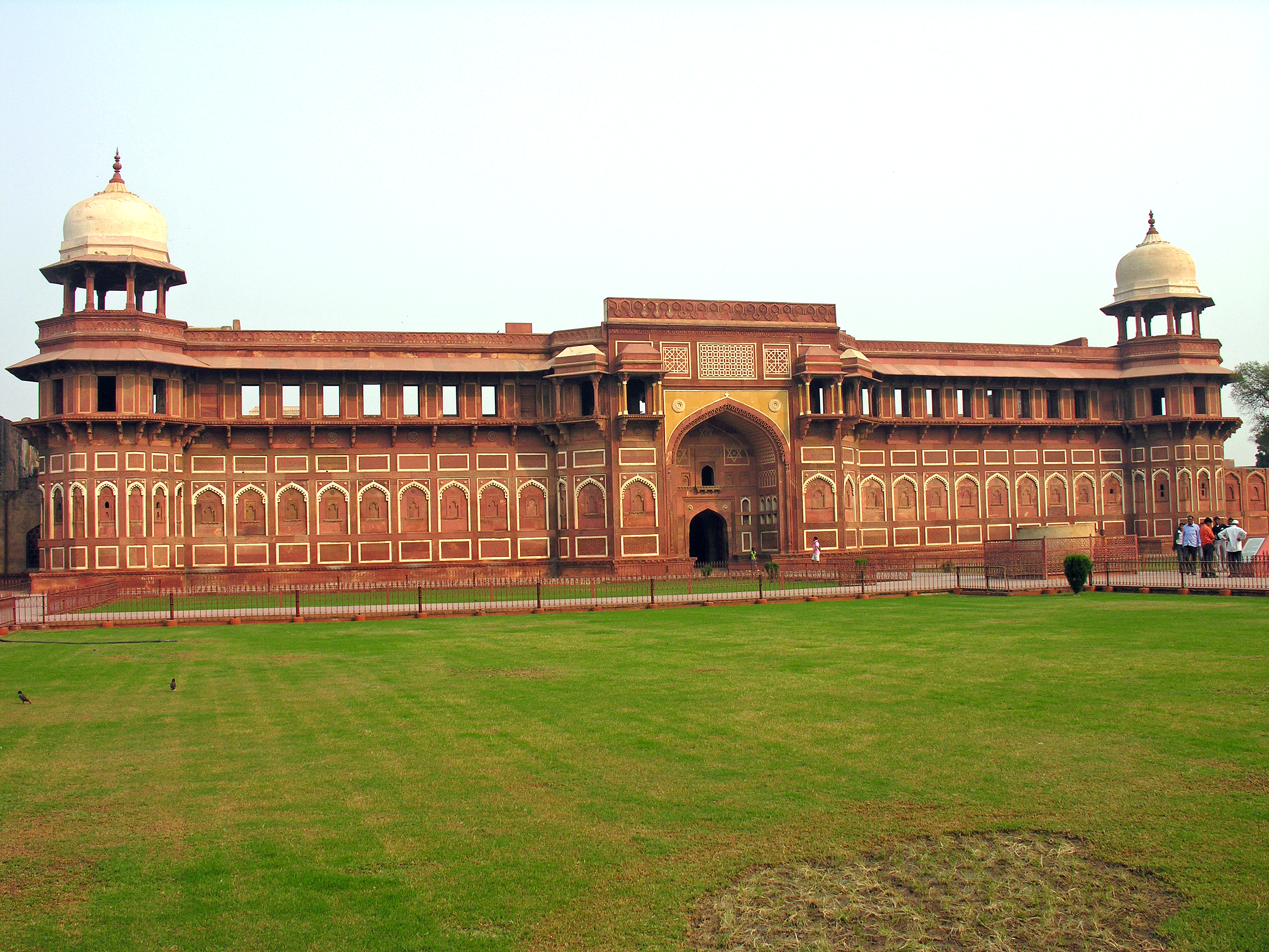 India-6243